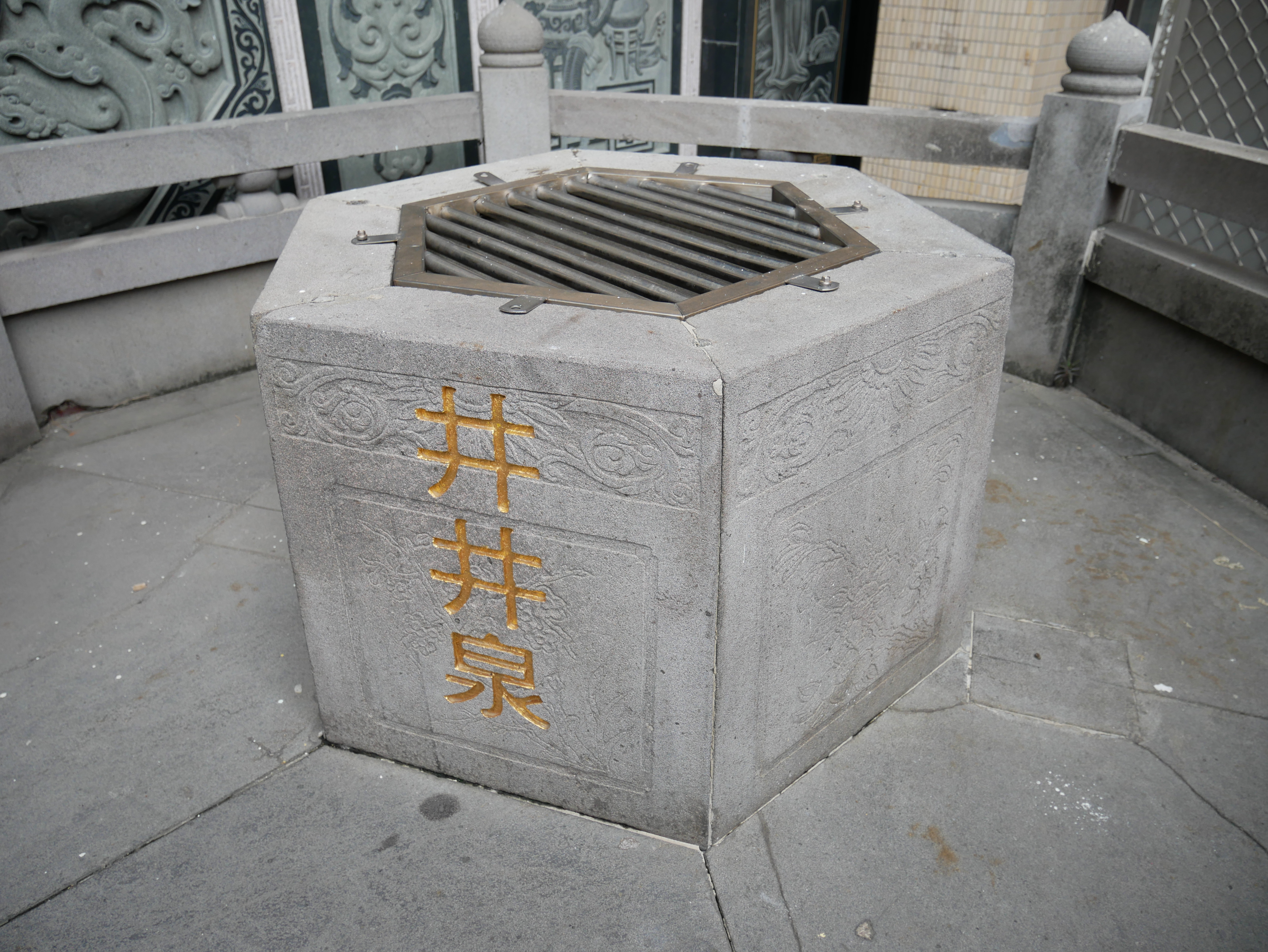 中港慈裕宮井井泉，苗栗縣竹南鎮中美里